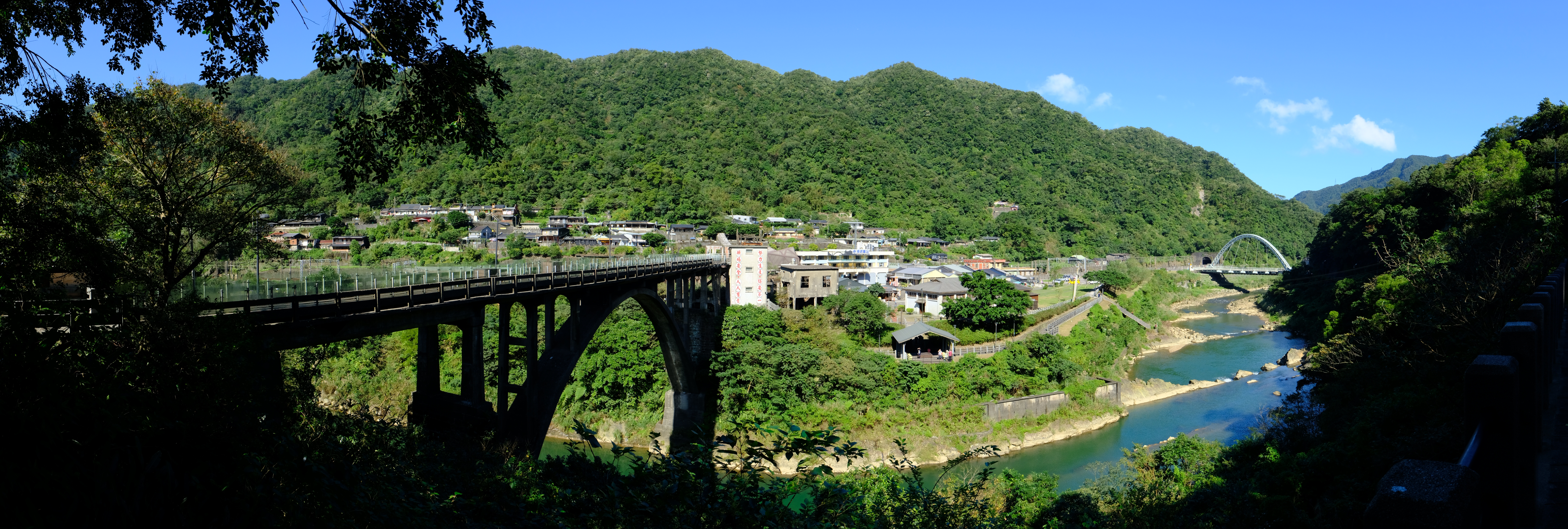 2018 TRA Houtong Station 猴硐車站&介壽橋& 運煤橋